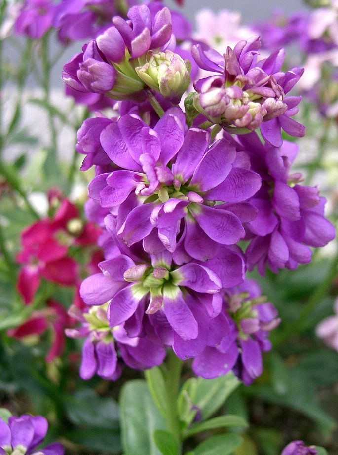 Matthiola incana